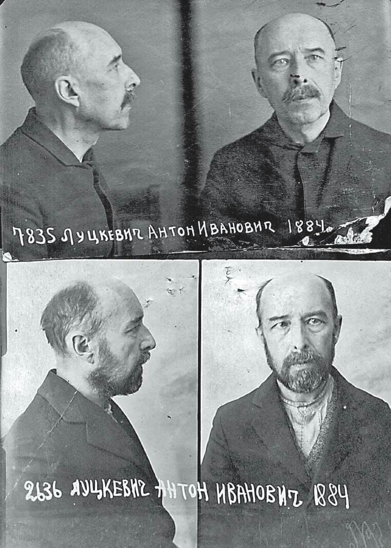 Антон Луцкевіч, беларускі палітычны і грамадскі дзеяч, публіцыст, літаратурны крытык, гісторык, лінгвіст, выдавец. Фотаздымкі з крымінальнай справы НКУС.